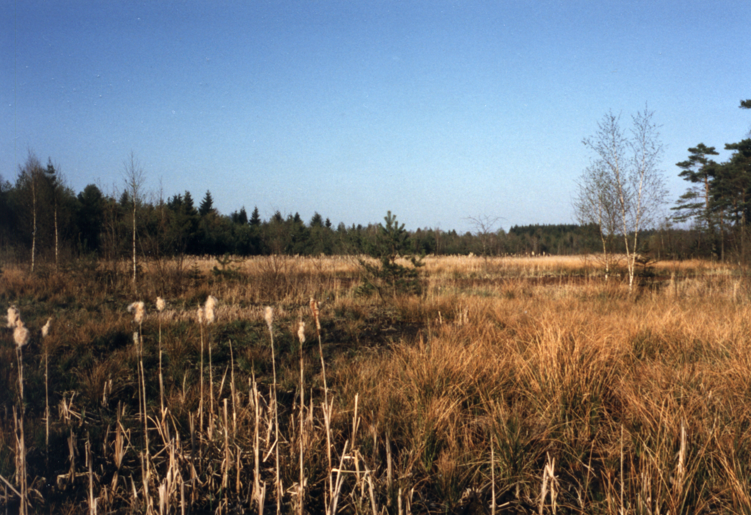 Schuhbräufilze bei Bad Aibling (1988); "Schuhbräu" moor near Bad Aibling (1988)